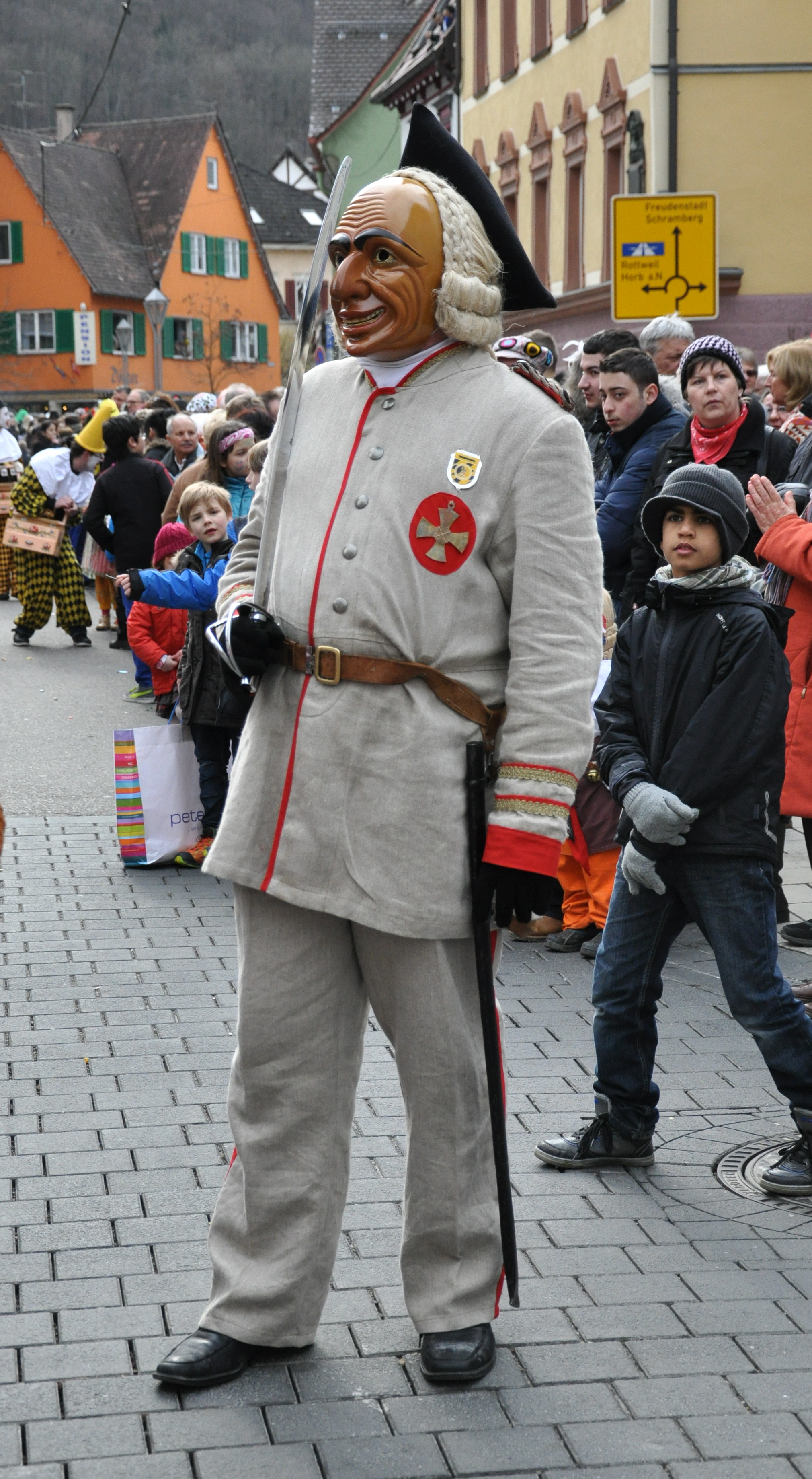 Oberndorf am Neckar, Narrensprung am Fasnetsdienstag nachmittag 2014, Polizeischantle